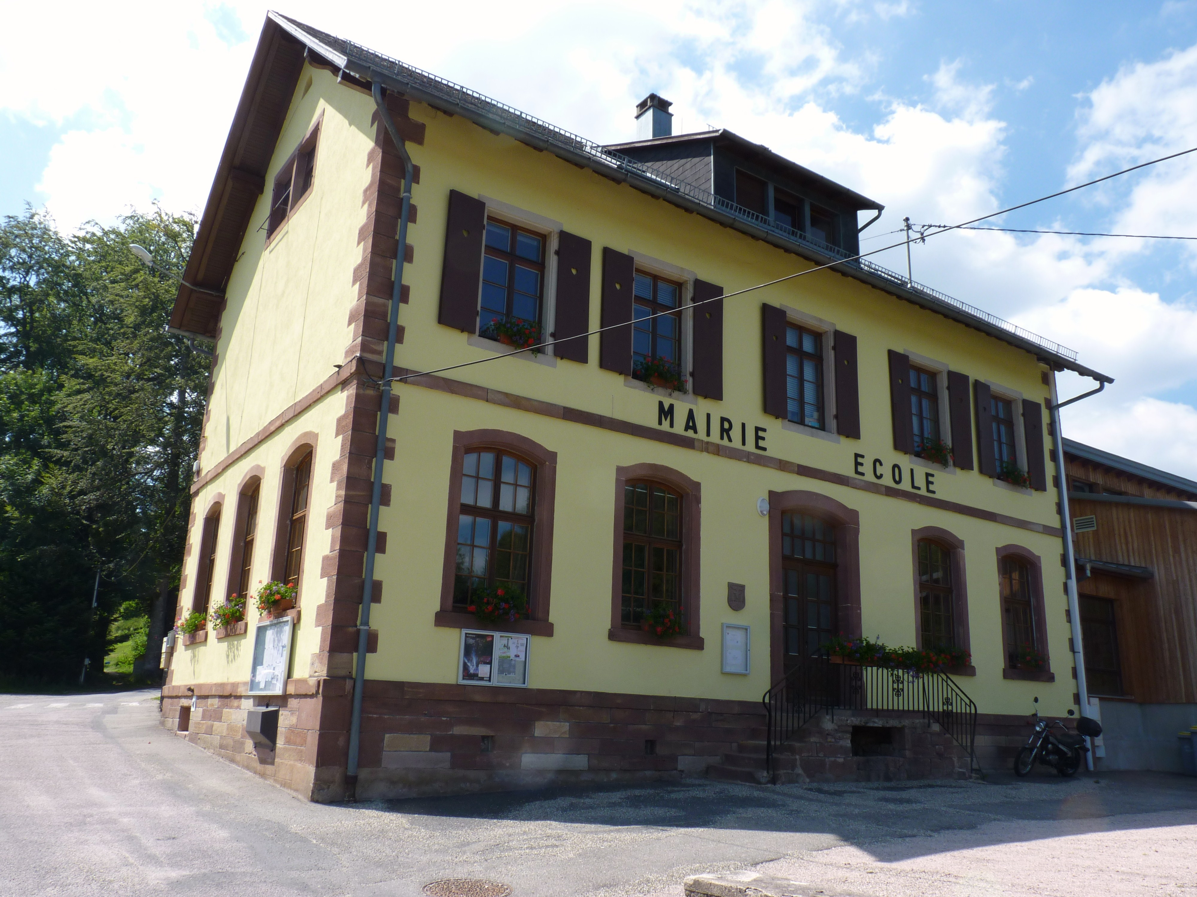 Mairie-École du Hohwald